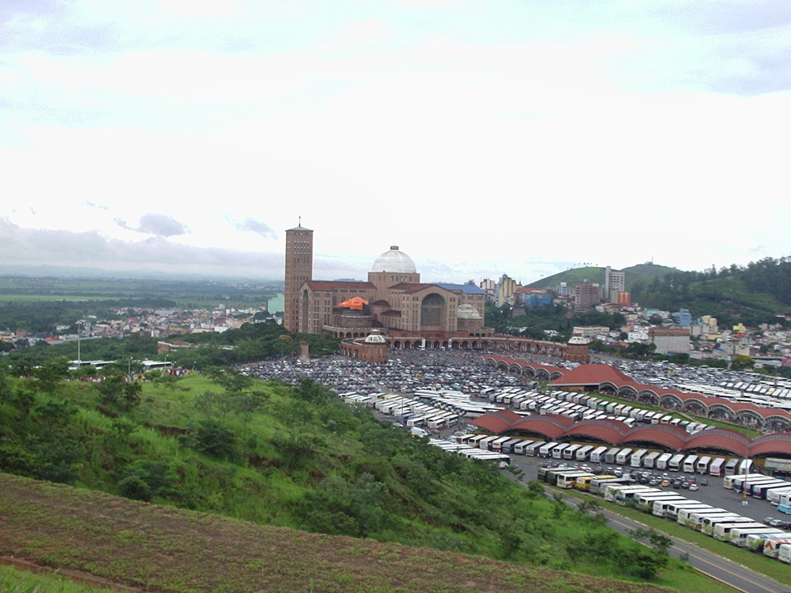 Santuario de Nossa Senhora Aparecida (Nuestra Señora Aparecida, en Brasil) Basílica de Nossa Senhora Aparecida na cidade de Aparecida, São Paulo.